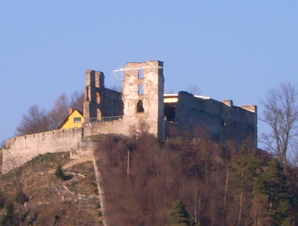 Burgruine Voitsberg, Voitsberg, Steiermark.